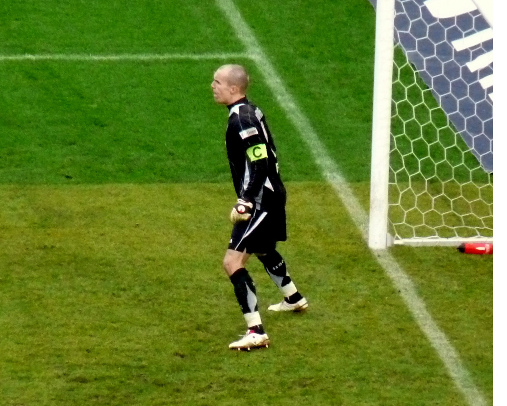 Robert Enke bei einem Bundesliga-Spiel